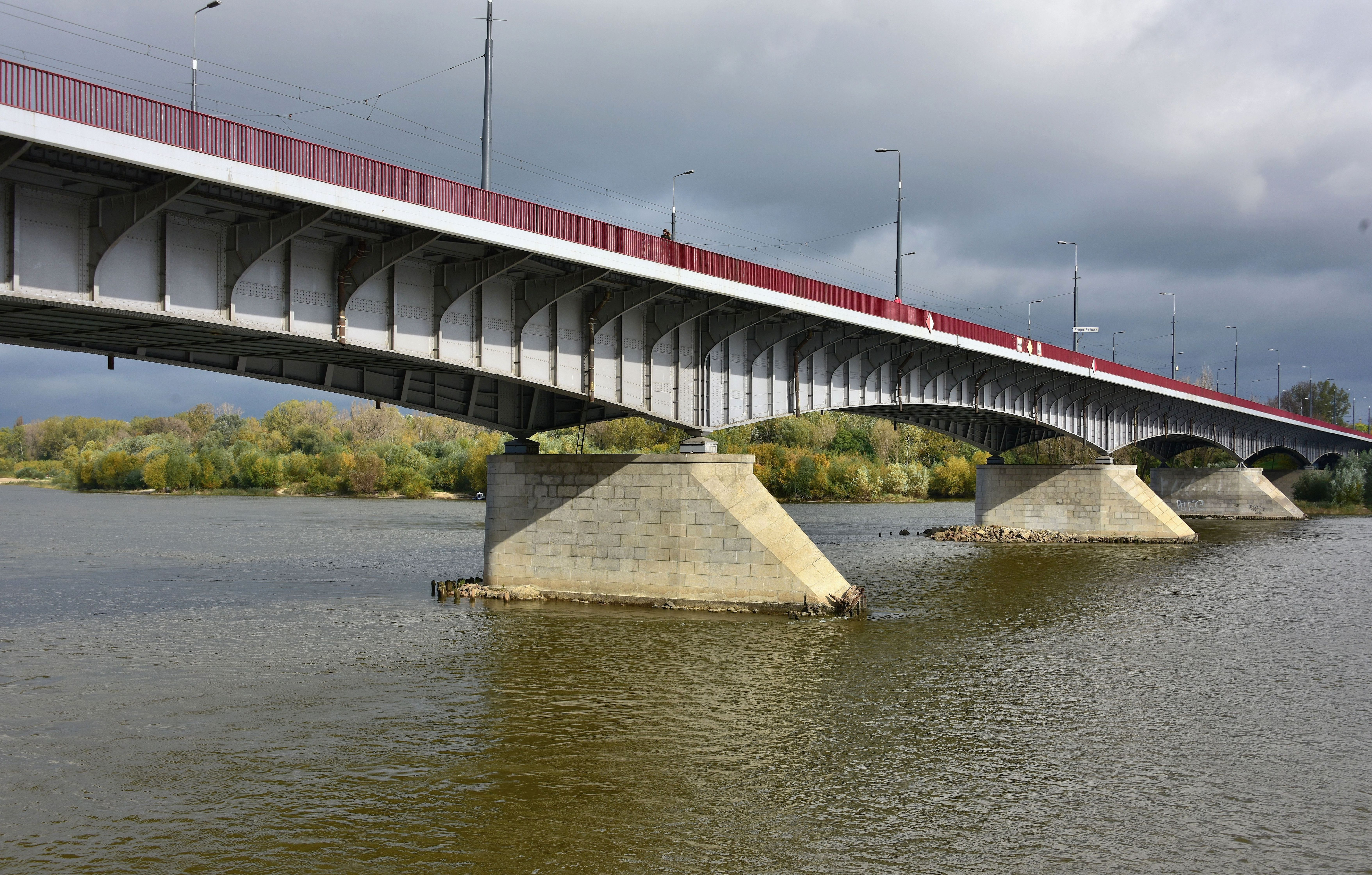 Most Śląsko-Dąbrowski w Warszawie, widok w kierunku Pragi-Północ